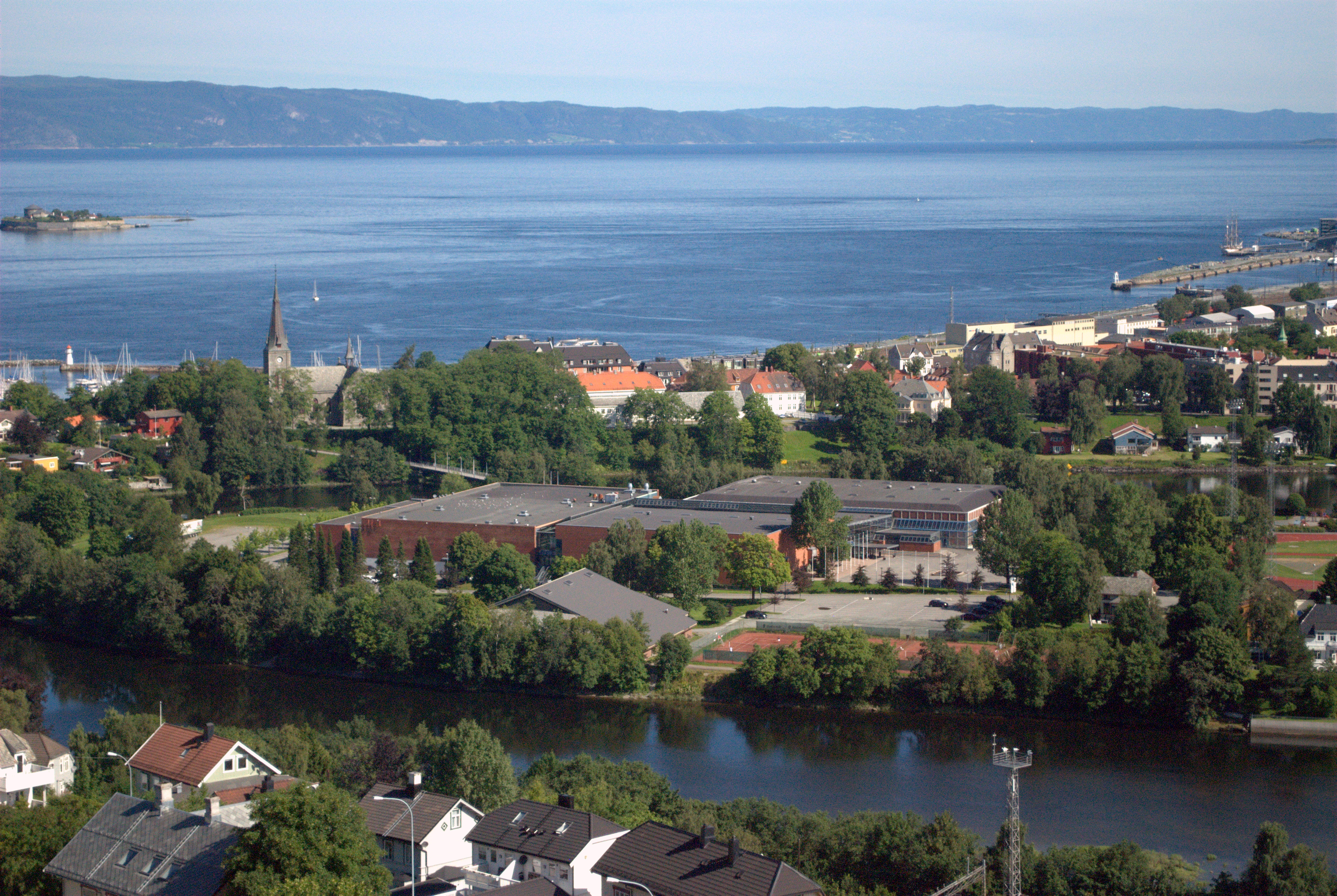 Trondheim Spektrum (Nidarøhallen) på Øya i Trondheim.